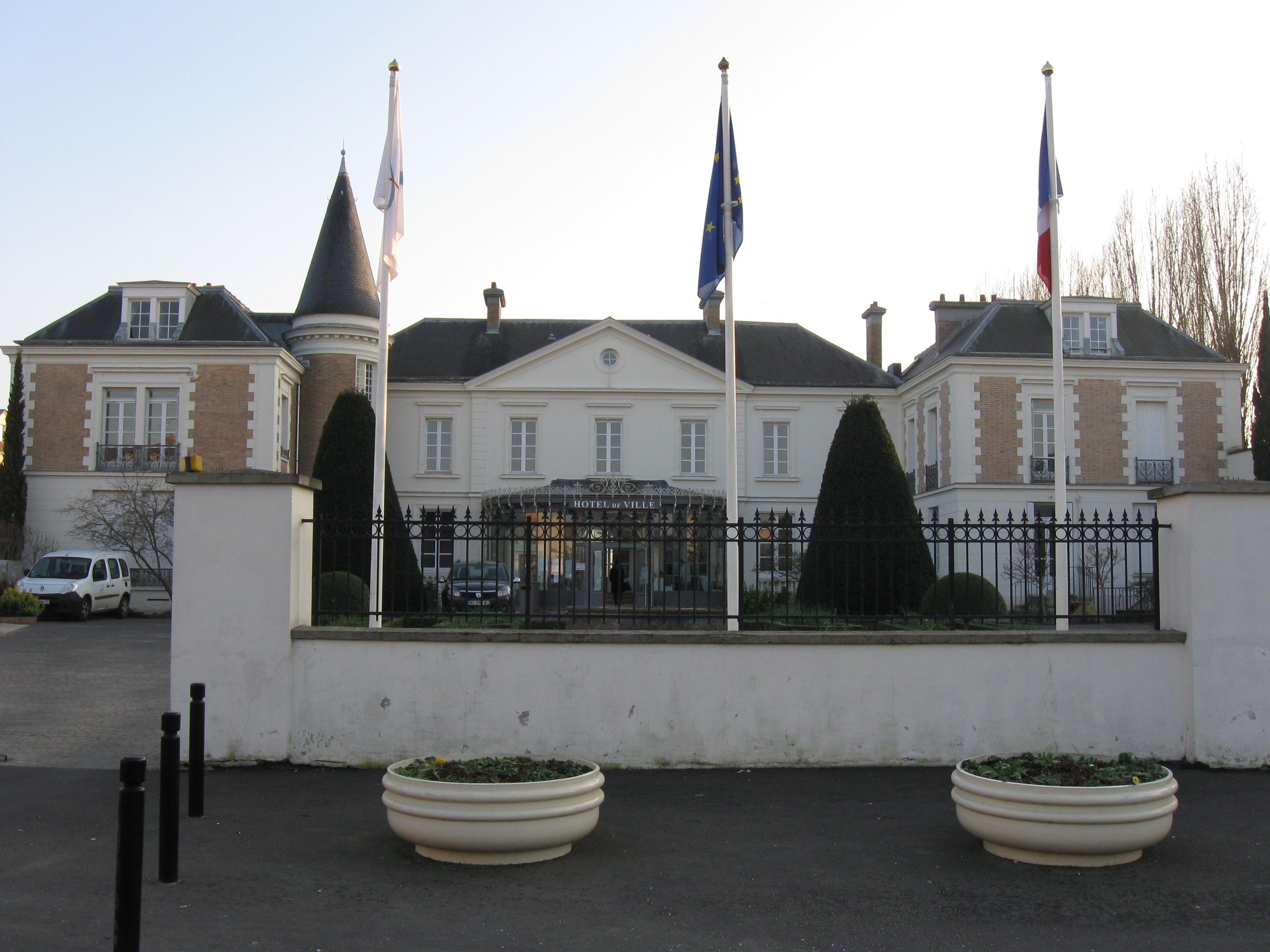 Château de Roissy, siège de ma mairie de Roissy-en-Brie. (Seine-et-Marne, région Île-de-France).